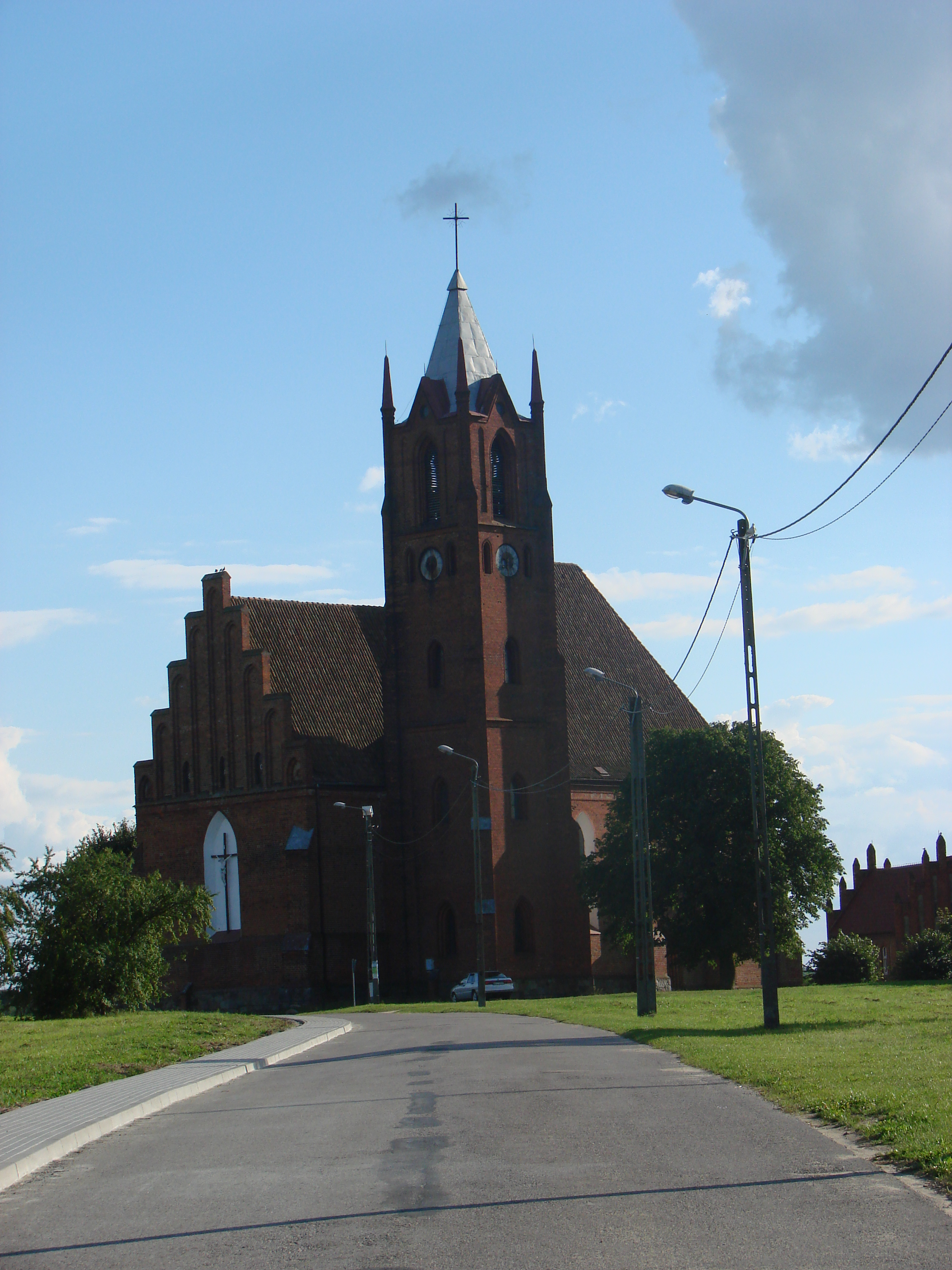 Kisielice, kościół par. p.w. Matki Boskiej Królowej Świata, 1 poł. XIV, 1856-1857, 1959